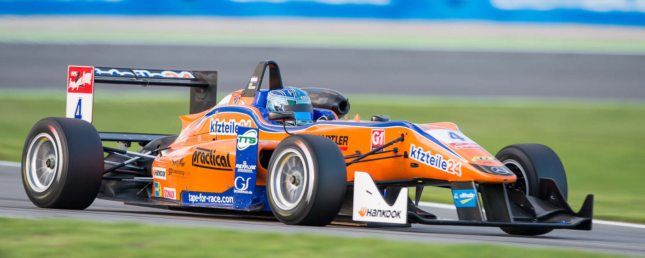 DTM,Dallara F312,Deutsche Tourenwagen Masters,F3 FIA European Championship,FIA Formel 3 Europameisterschaft,Hockenheimring,Mercedes-Benz,Motorsport,Mücke Motorsport,Roy Nissany,kfzteile24